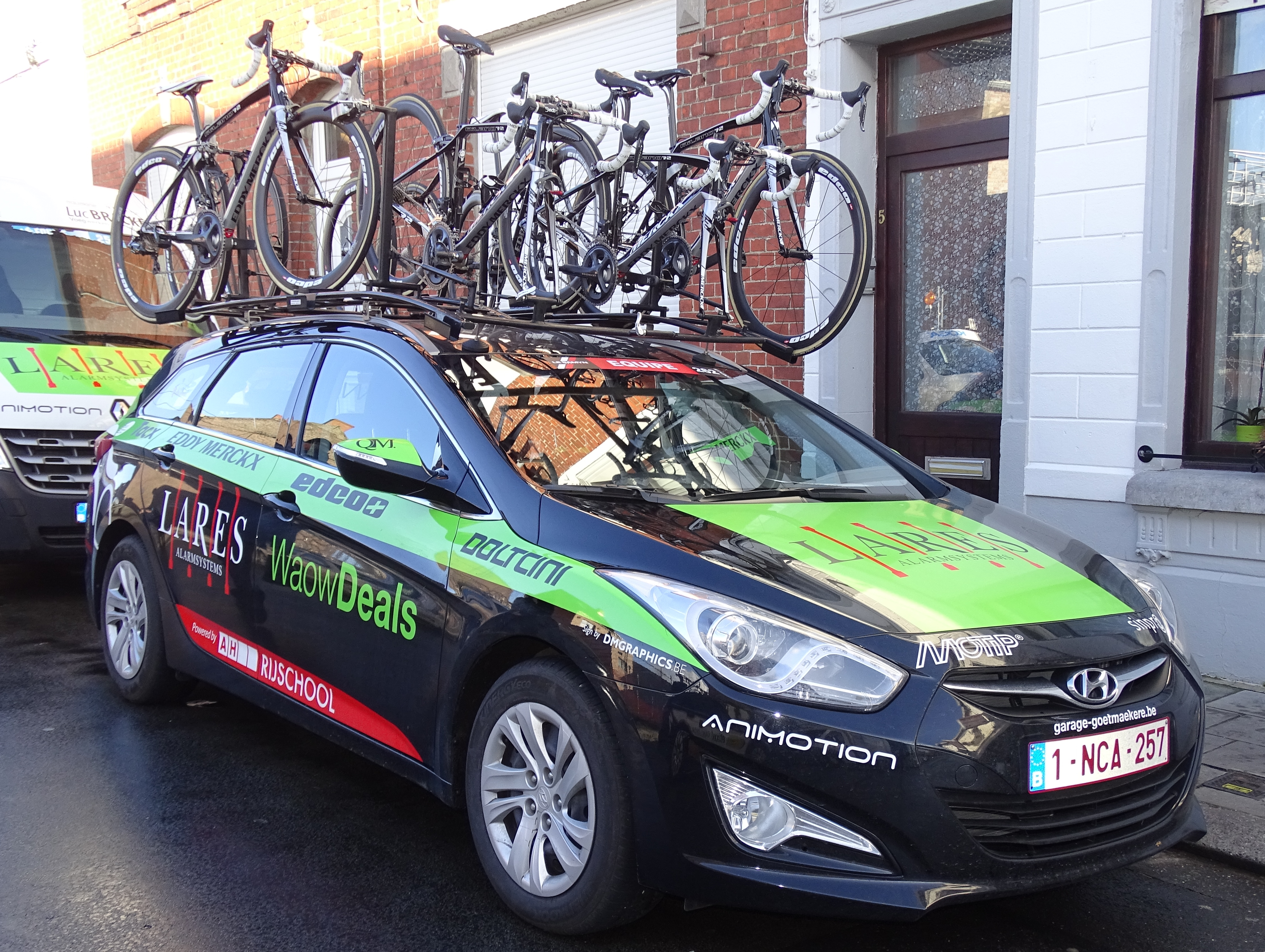 Reportage réalisé le mercredi 2 mars à l'occasion du départ du Samyn des Dames 2016 et du Samyn 2016 à Quaregnon, Belgique.